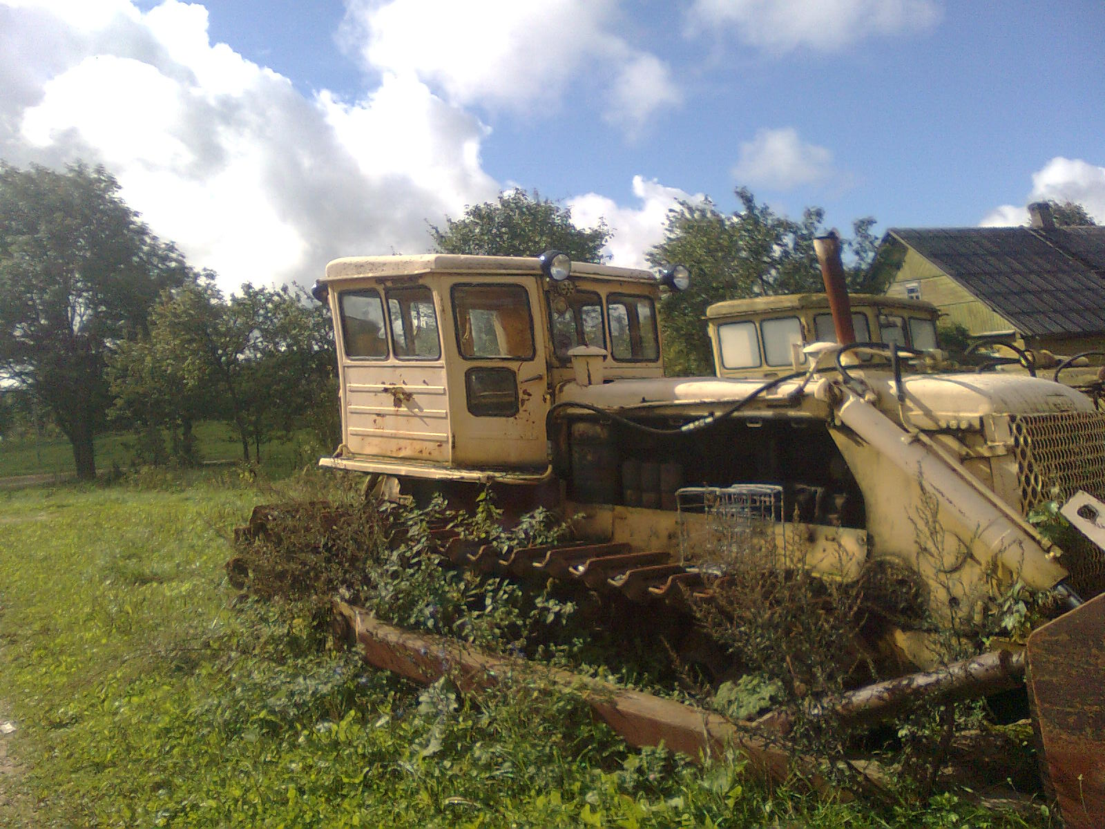 2010 09 05 baz t180